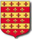 armorial du seigneur et de la ville de Brucourt : fascé d'or et de gueules aux 21 fleurs de lys de l'un en l'autre 4 sur les fasces d'or et trois sur les fasces de gueules